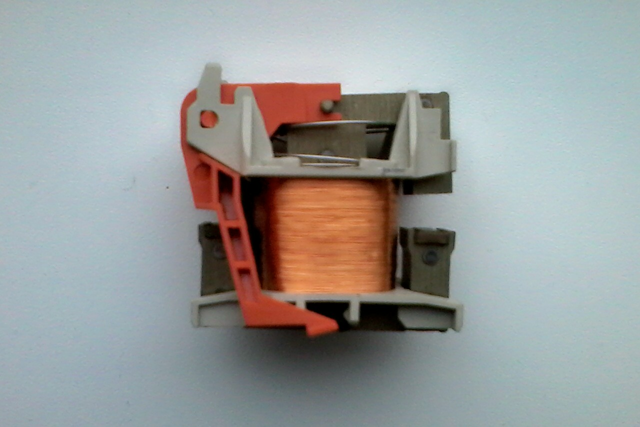 Знято мобілкою Самсунг